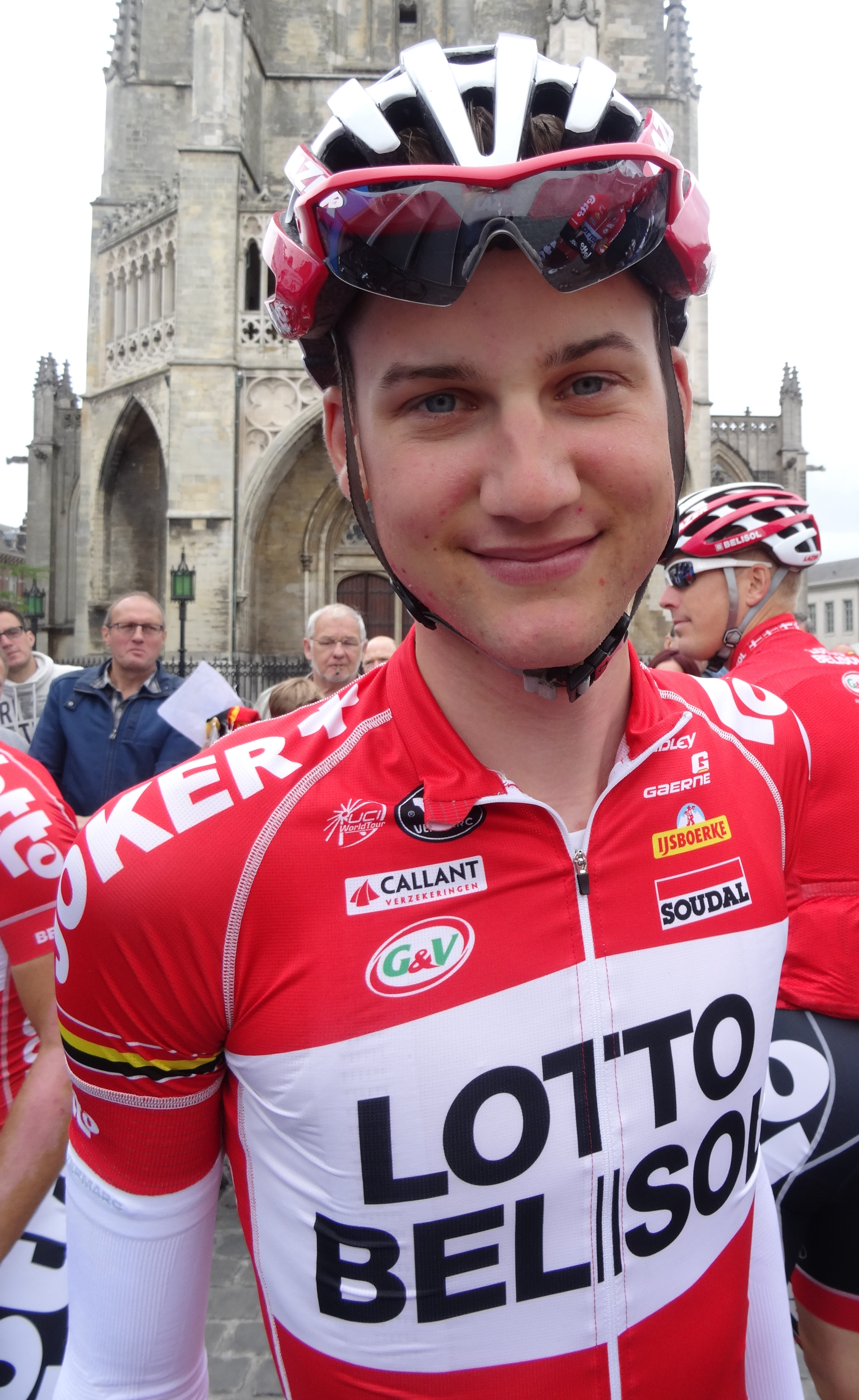 Reportage photographique réalisé le dimanche 15 juin à l'occasion du départ et de l'arrivée du Tour du Limbourg 2014 à Tongres, Belgique.